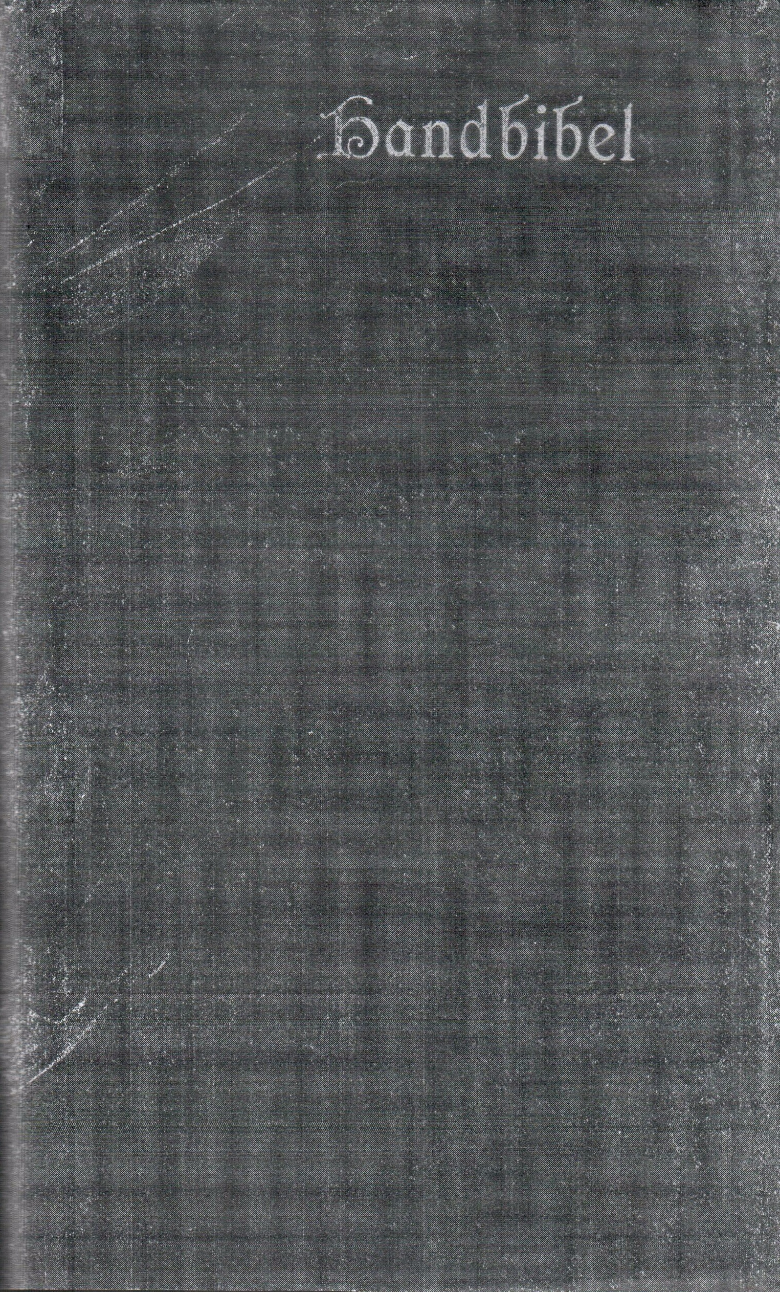 Die 1908 von Franz Eugen Schlachter herausgegebene Handbibel